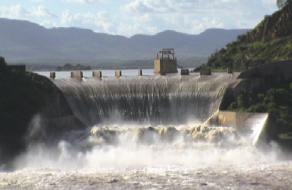 Açude de Orós sangrando, 2007